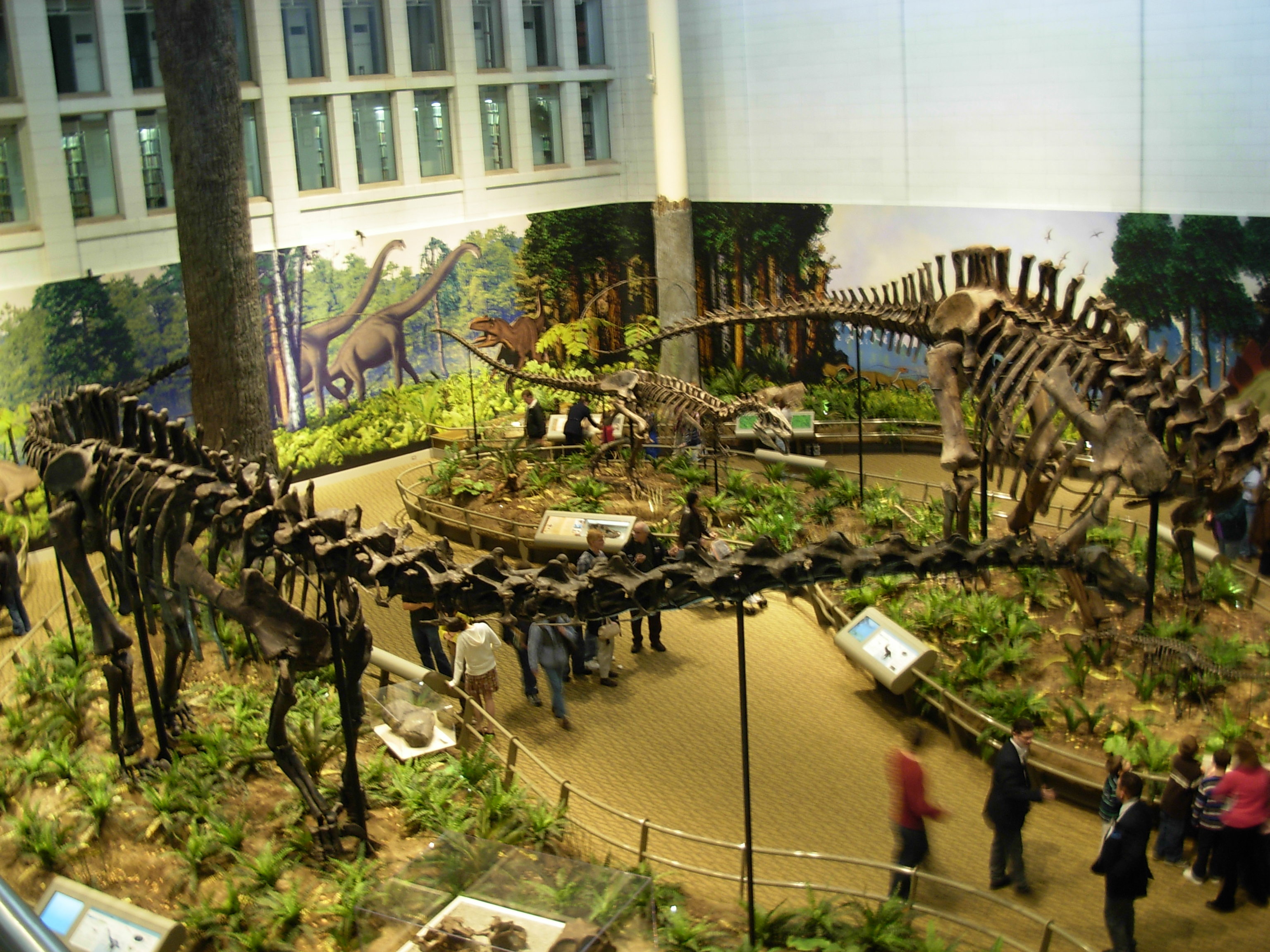 Diplodocus Allosaurus & Apatosaurus